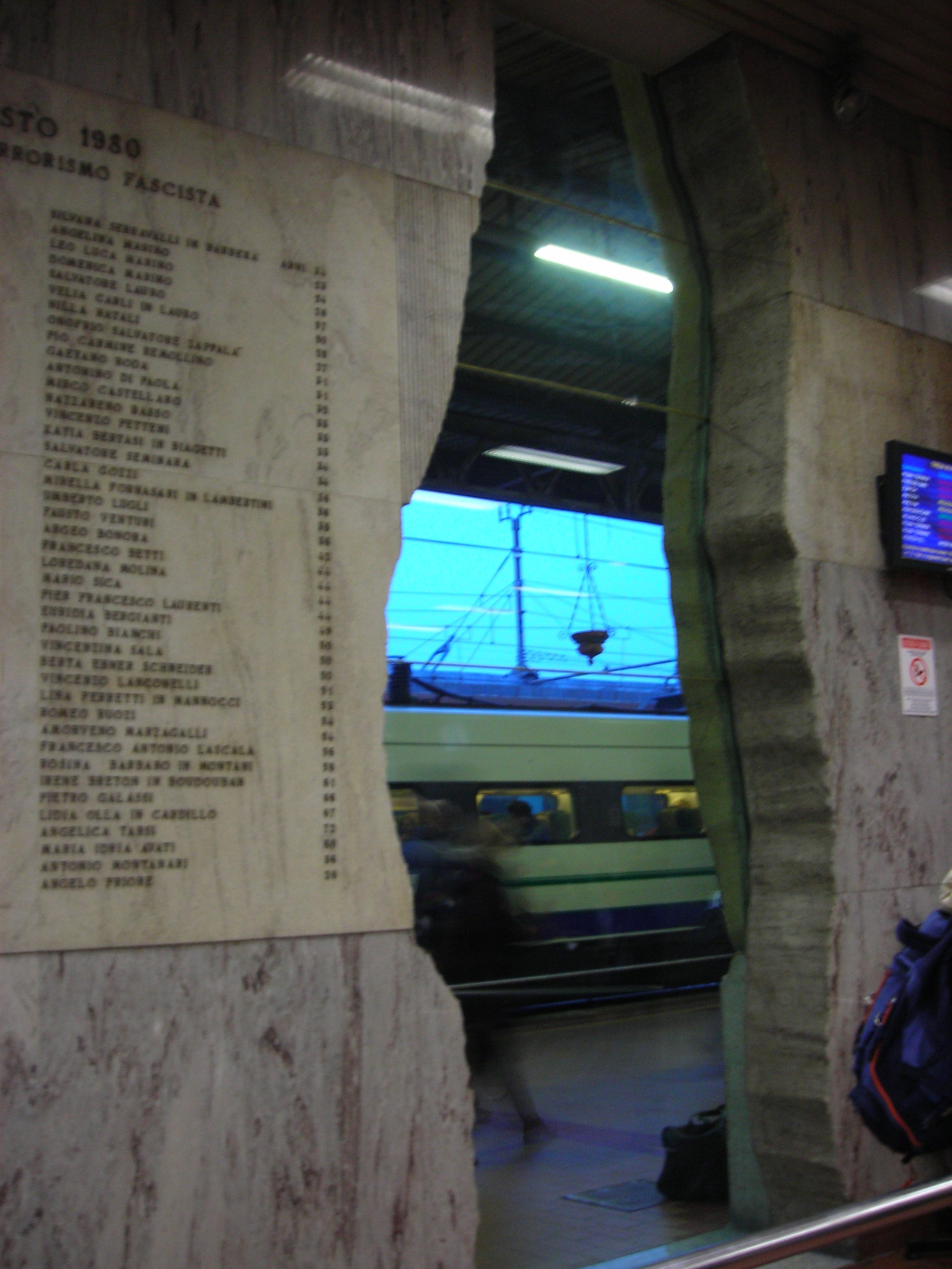 Agujero construido en la pared en recuerdo del atentando en la estación de Bolonia del 2 de agosto de 1980